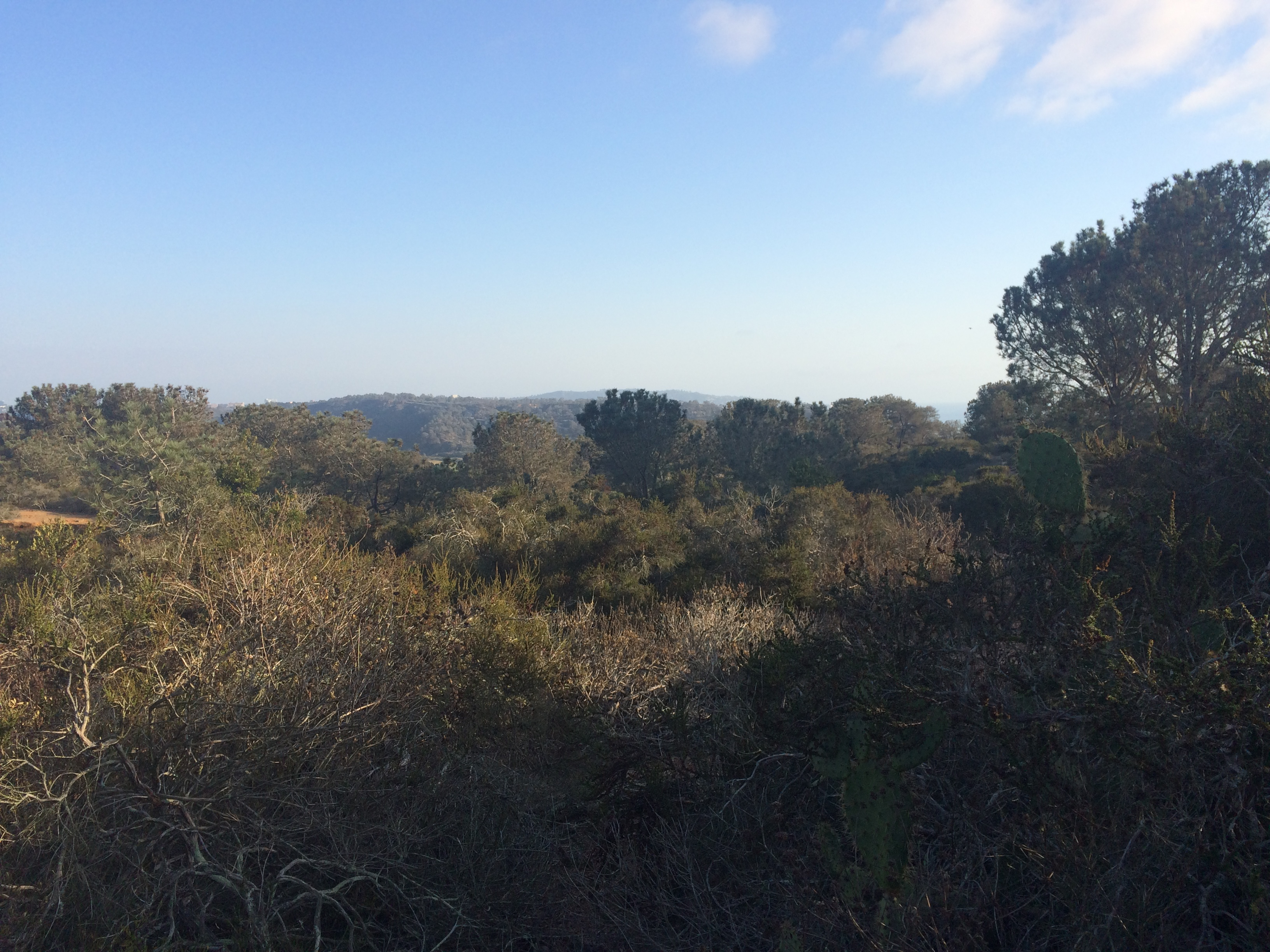 Del Mar Heights, San Diego, CA 92014, USA